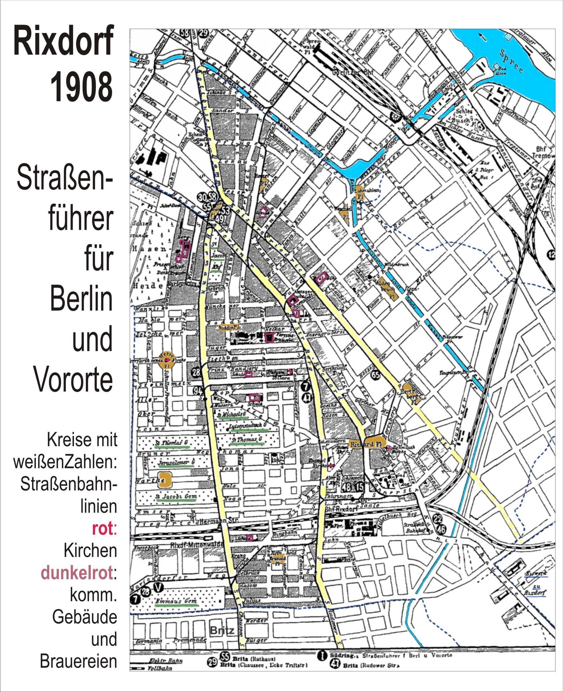 Straßenplan Rixdorf 1908, nachbearbeitet